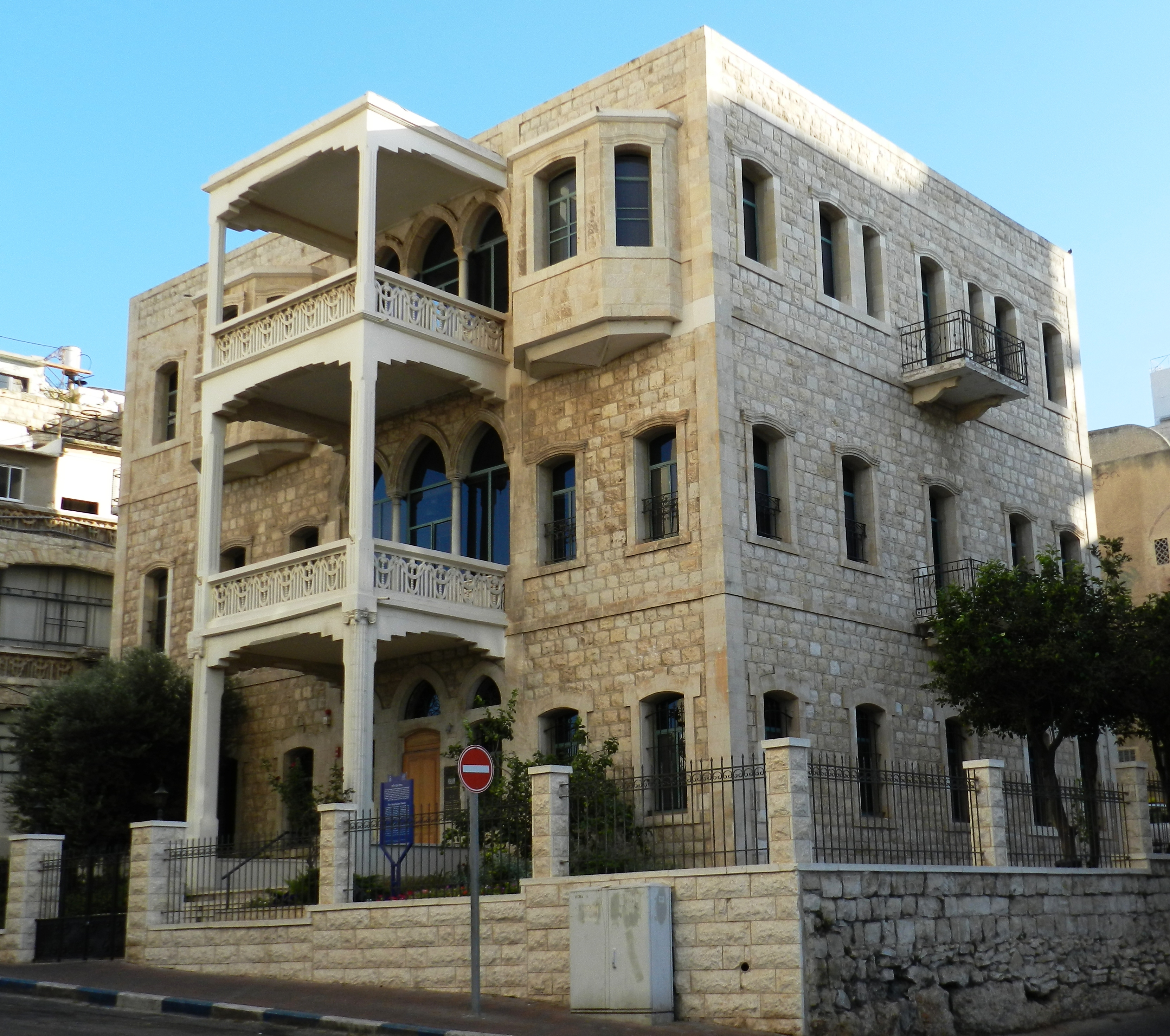 בתי מג'דלאני בחיפה